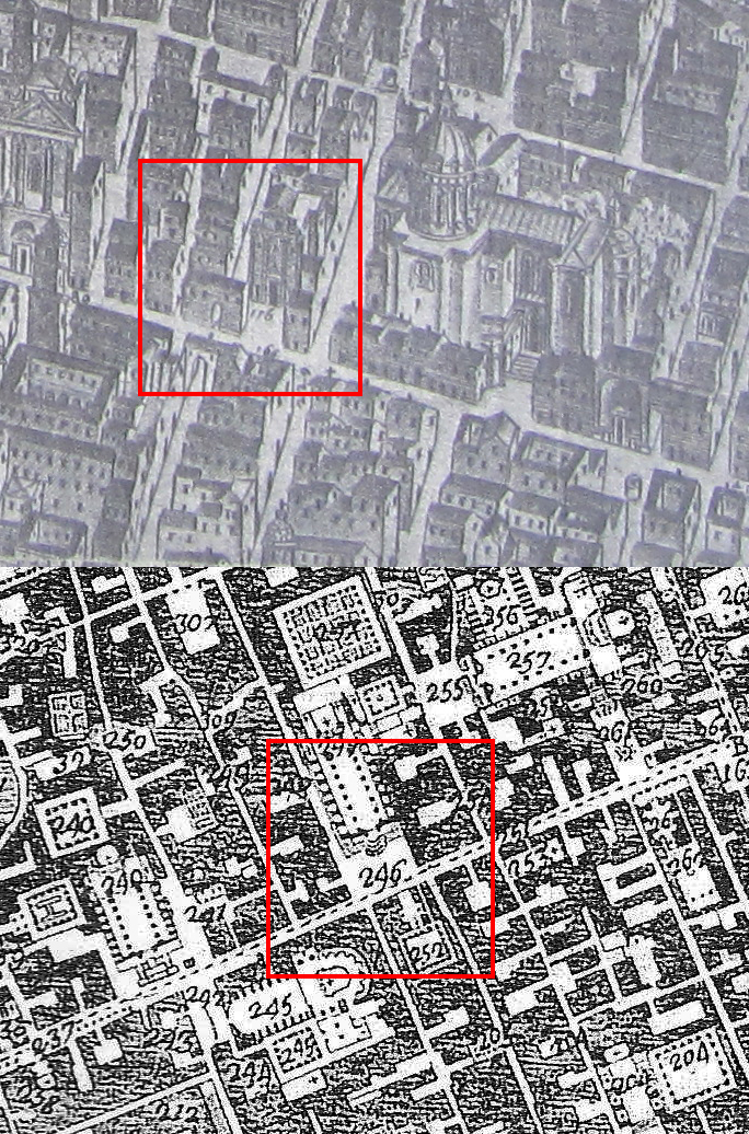 Genesi dello spazio antistante la chiesa dei Girolamini. a. Veduta Baratta, 1629 b. Pianta Duca di Noja, 1775